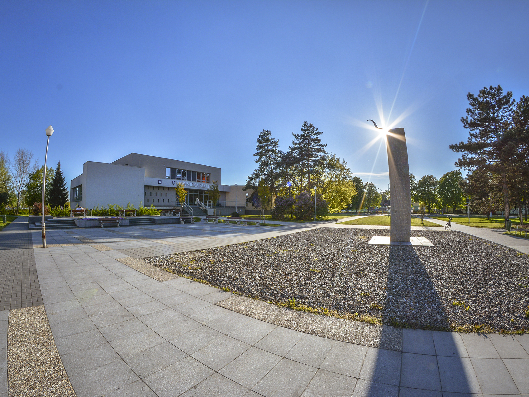 PFUP_buldingA